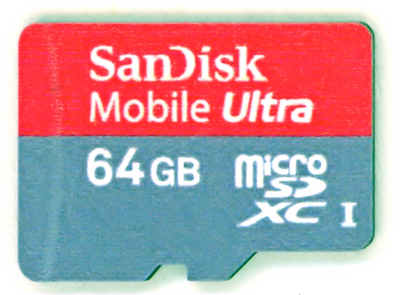 SanDisk microSDXC Ultra Mobile SD-Karte mit 64 GB Speicherkapazität, Abmessungen: 15mm x 11mm